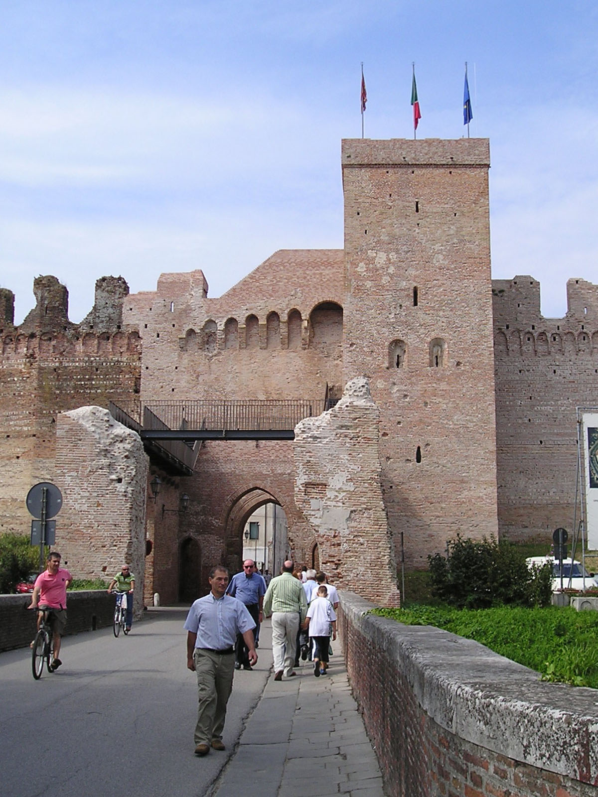 Cittadella: Porte Trevisane.